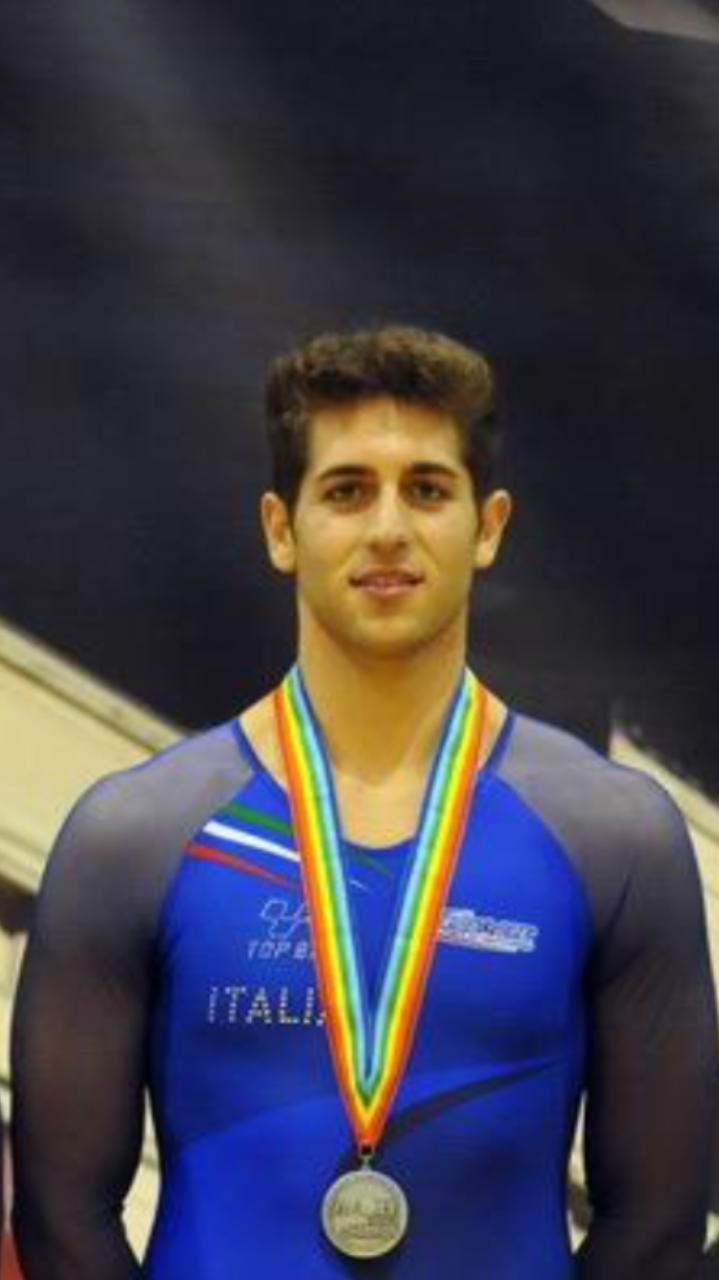 Angelo De Benedictis a Auckland (New Zeland) Campionati del Mondo 2012